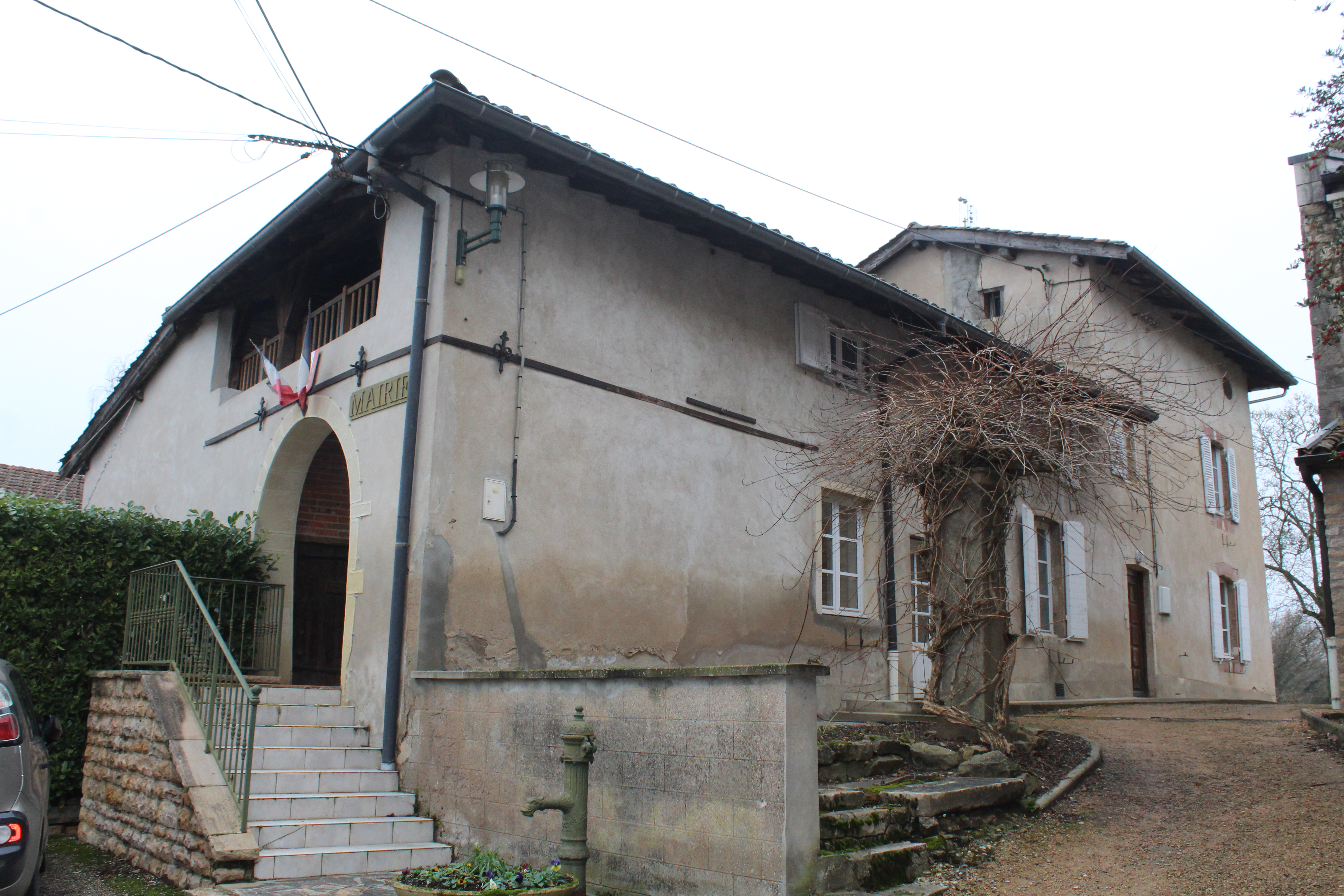 Mairie d'Illiat.